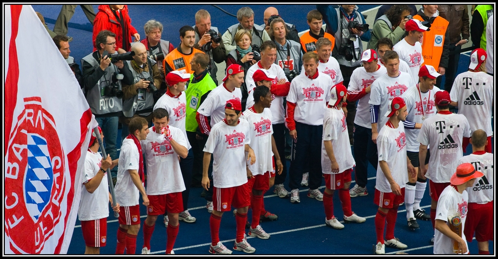 FC Bayern München - Deutscher Meister 2010